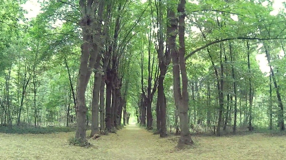 Allée des Moines,Lac des Minimes, Paris.